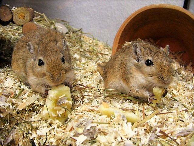 Mongolische Steppenrennmäuse (Meriones unguiculatus), wildfarben